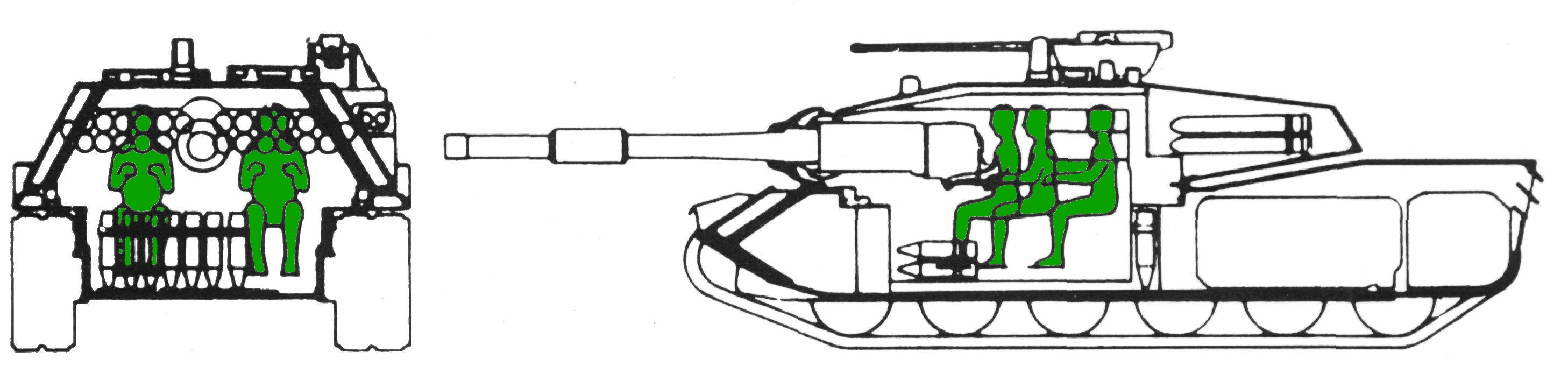 MBT-70 final design sketch.